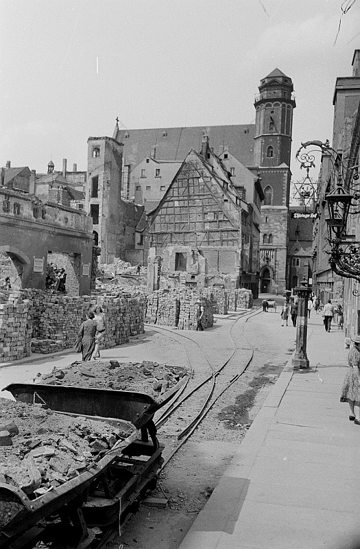 Original image description from the Deutsche FotothekBurgstraße mit Blick auf Thomaskirche